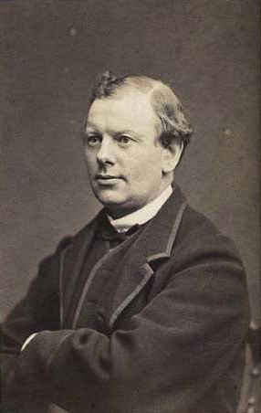 Julius Hoffensberg (1828-1895), Danish industrialist